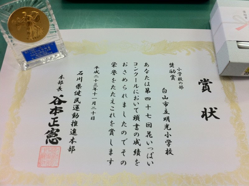 花いっぱい運動での賞状（2011年）